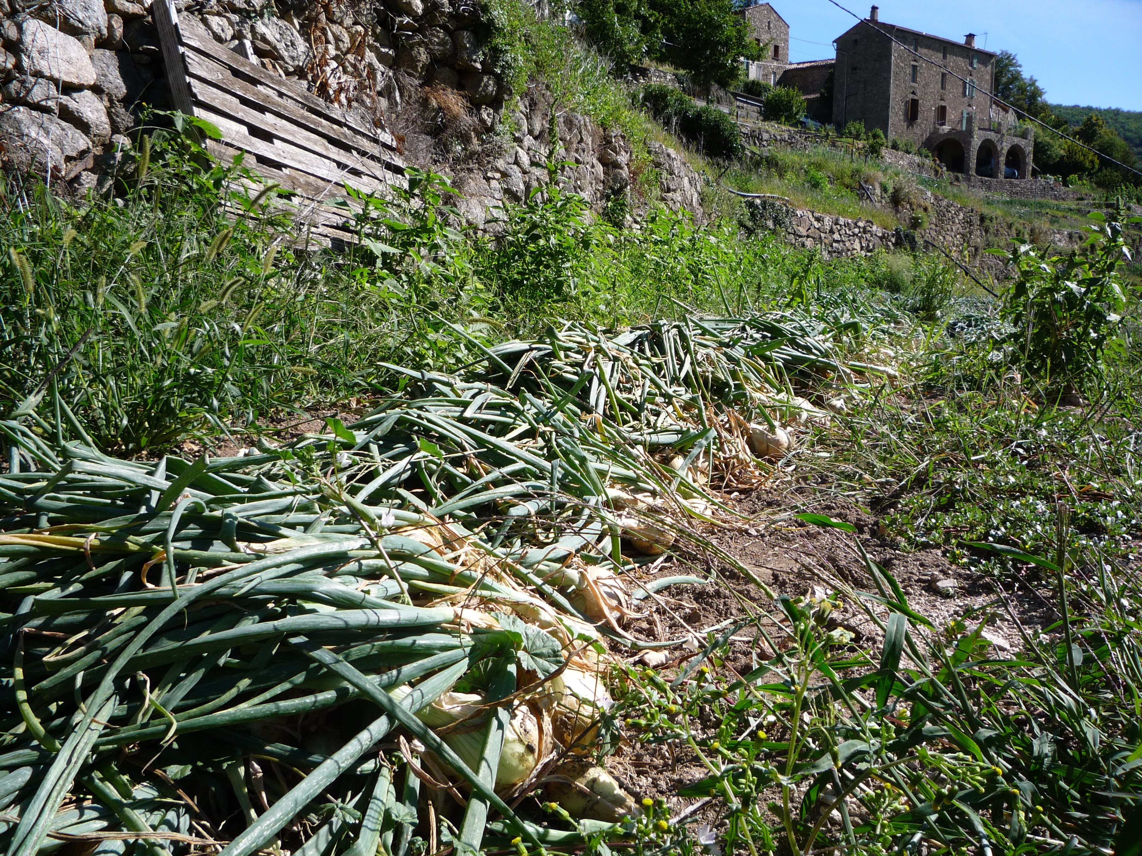 L'arrachage de l'Oignon Doux des Cévennes